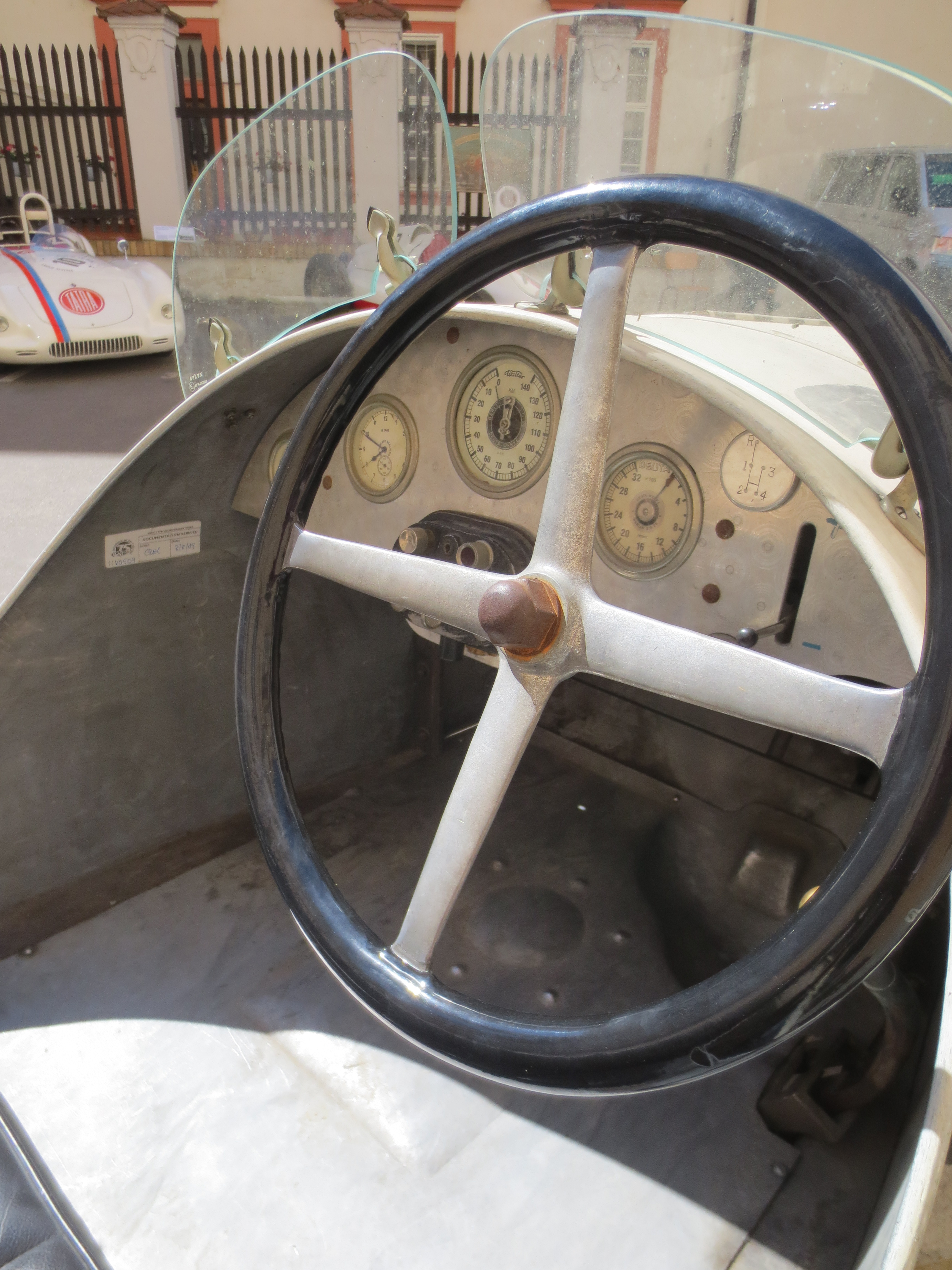 Walter WZ závodní, výstava sportovních automobilů ČVUT (2017)